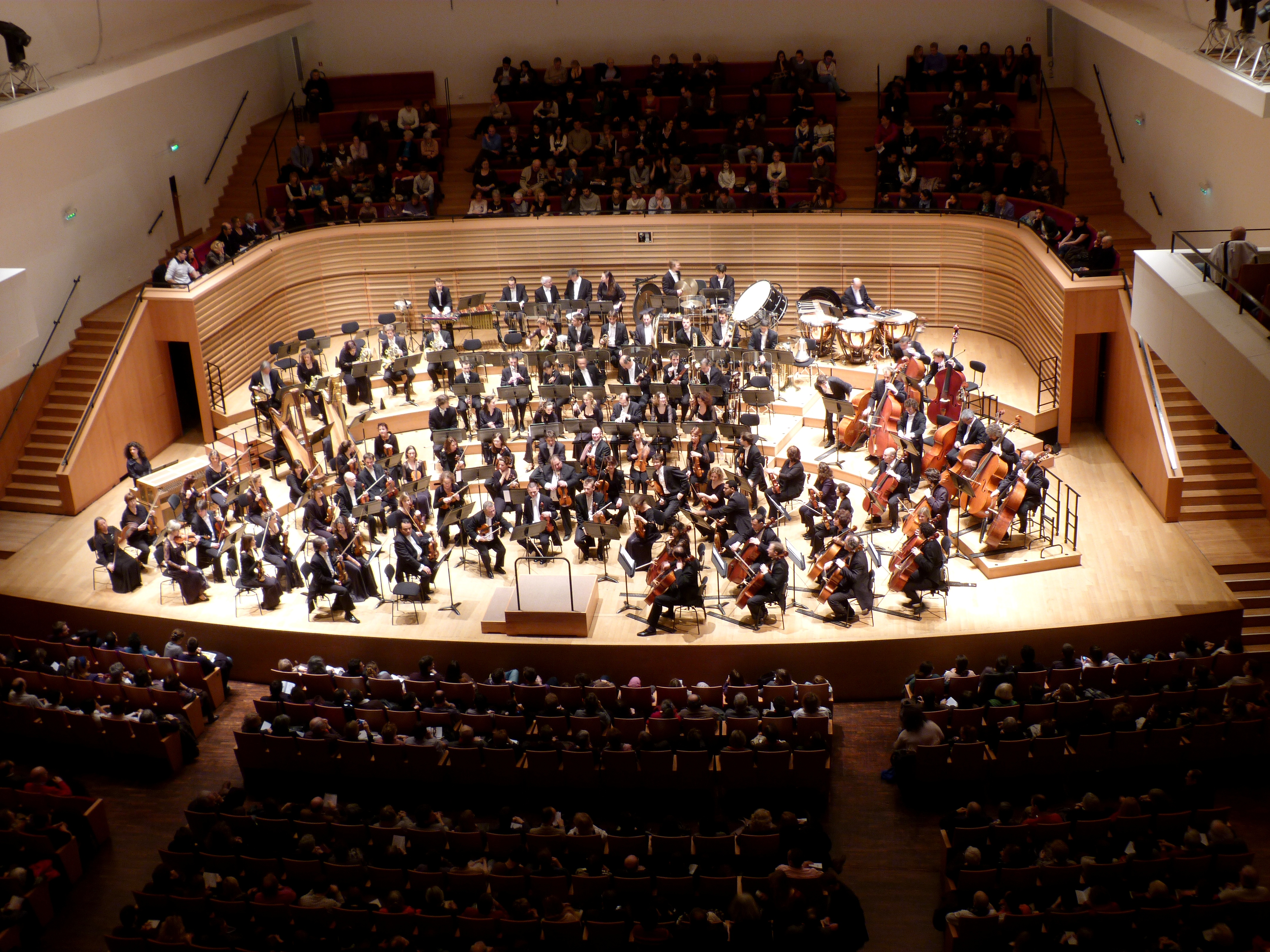 L'Orchestre symphonique d'Île-de-France à la Salle Pleyel le 23 janvier 2011.